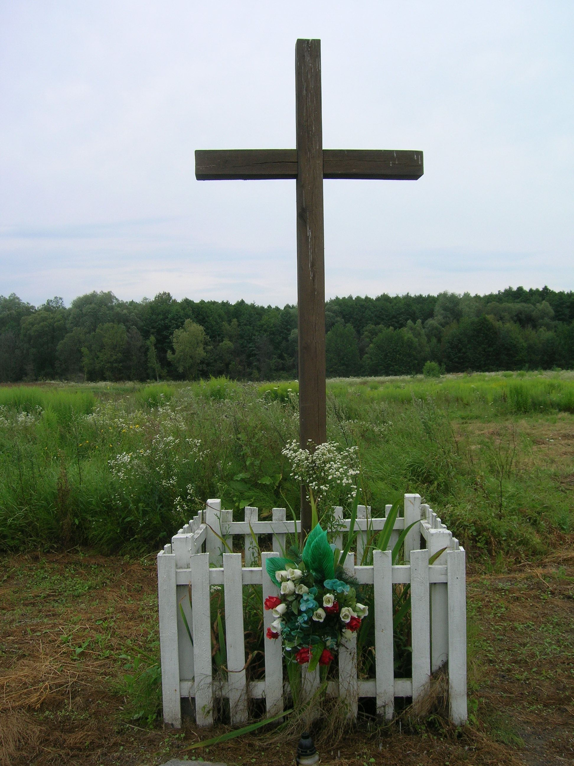 Ostrówki. Krzyż postawiony w miejscu mogiły "u Trusiuka".